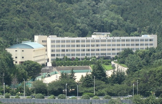 부산광역시 남구 대연동 동천고등학교 젼경